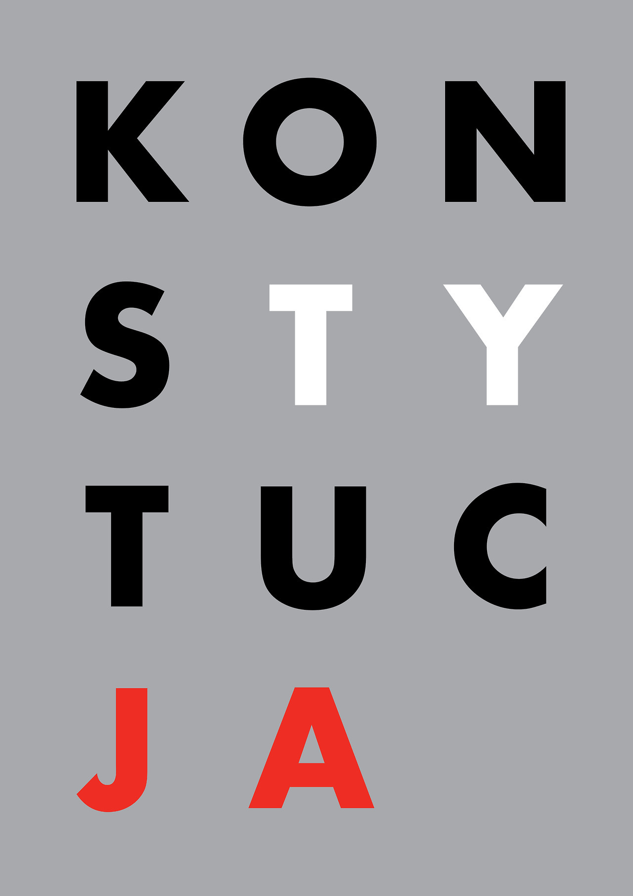 grafika wg projektu Luki Rayskiego